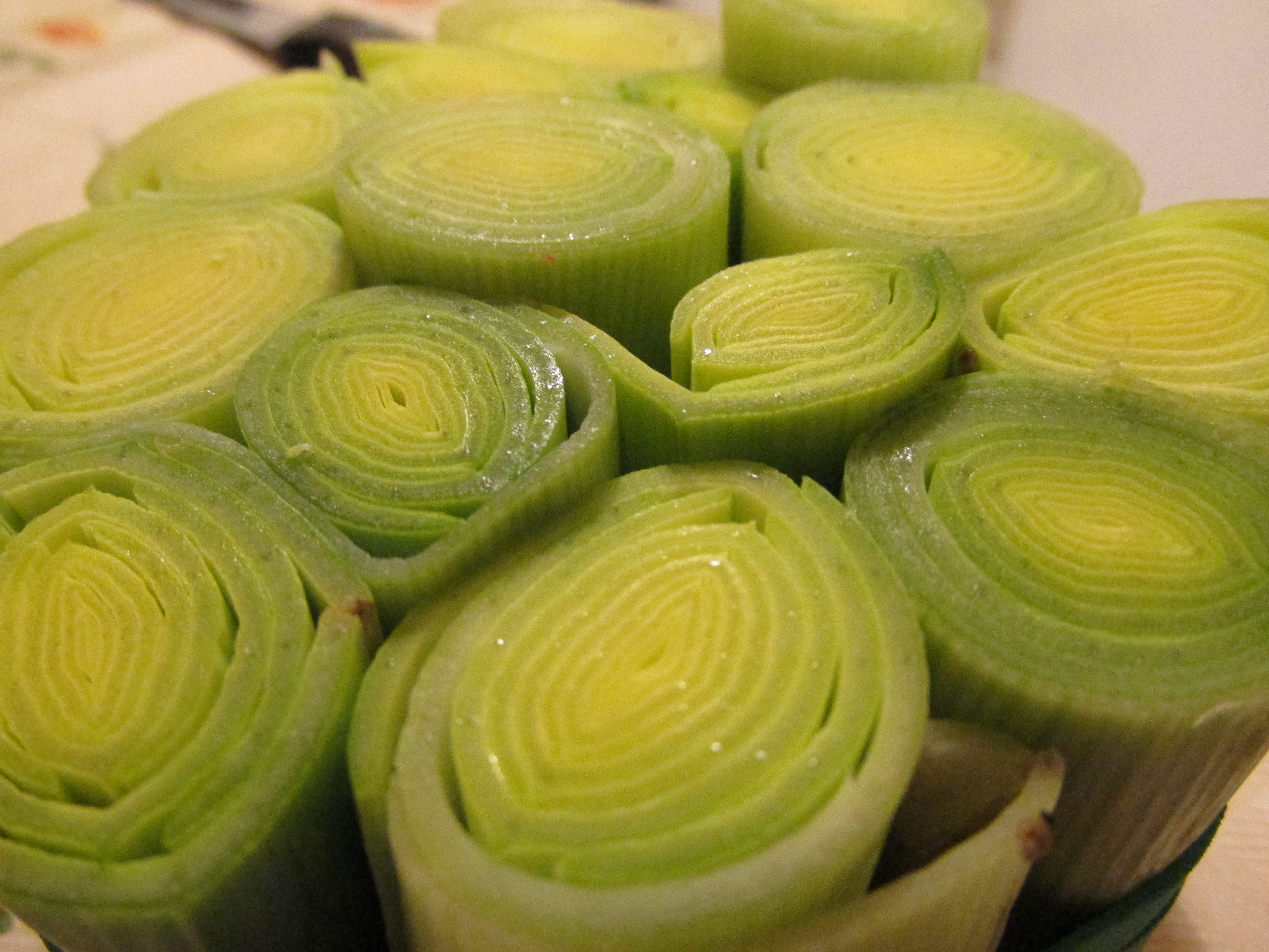 Porri